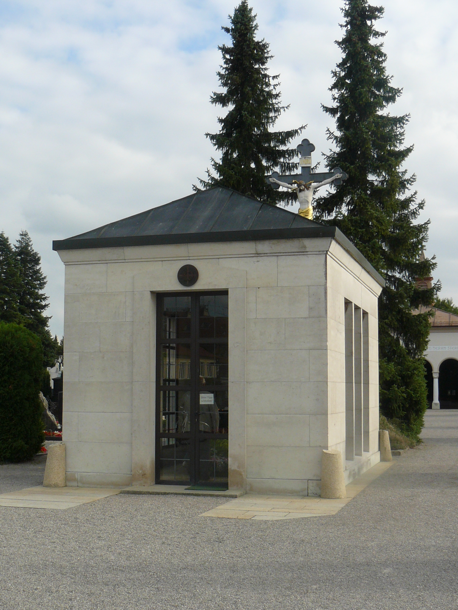 D-7-78-116-18 Kneipp-Mausoleum, Aussenansicht, St.-Anna-Str. 6, Bad WoerishofenThis is a photograph of an architectural monument.